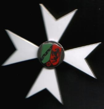 Verdienstkreuz des Landes Nordrhein-Westfalen (Privatbesitz N.Luffy, 52223 Stolberg) (Verdienstorden)